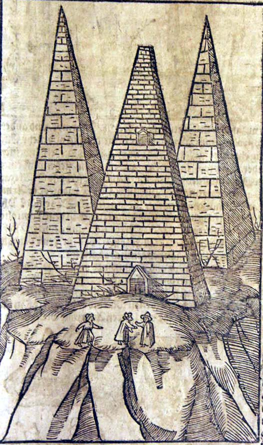 Une vue des pyramides de Gizeh tirée de la cosmographie universelle de Sébastien Munster, 1544